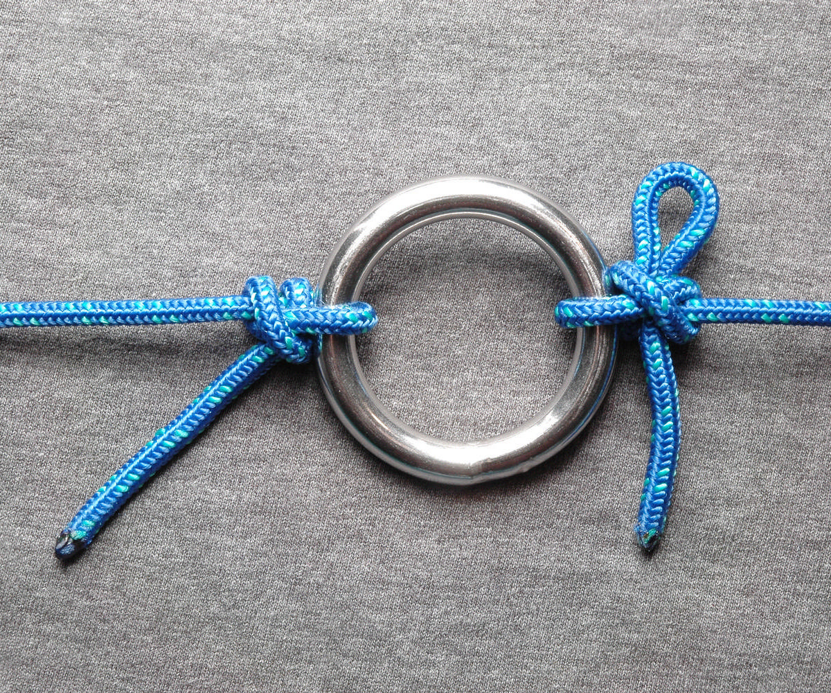 Left: Buntline hitch (ABOK #1711). Right: Slipped buntline hitch (#1712)